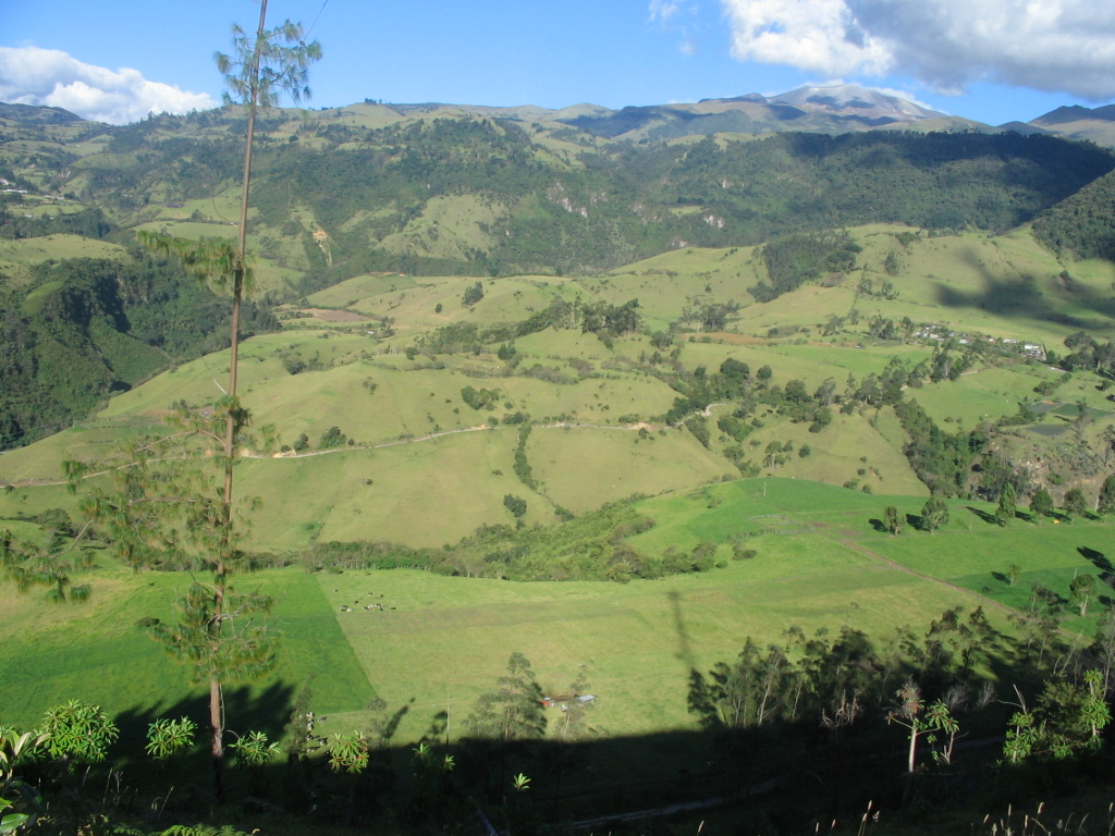 Fotografía de la zona de puracé